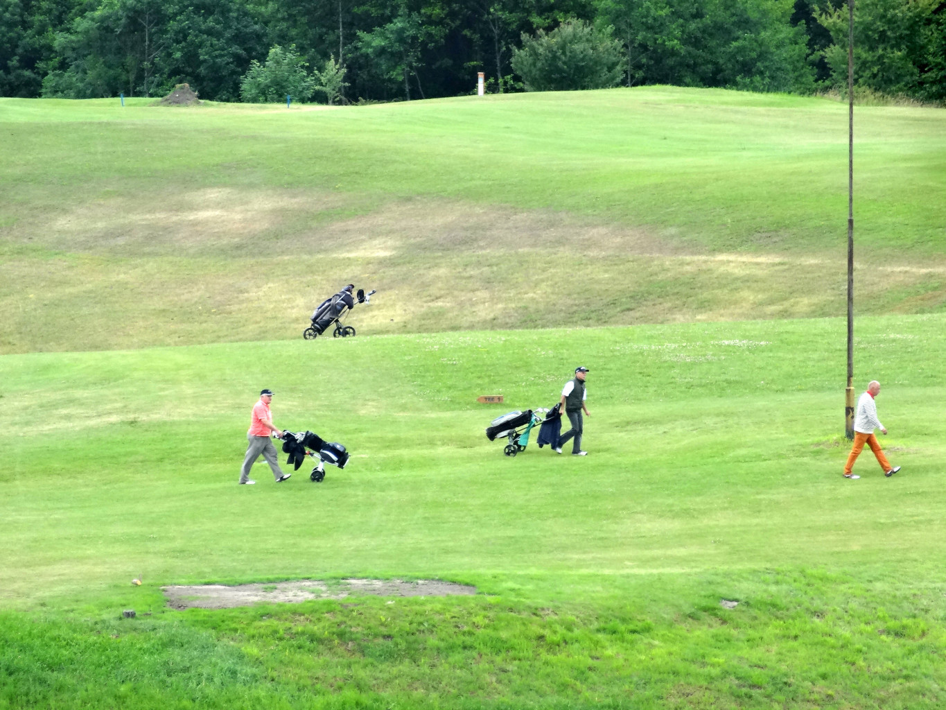 Pole golfowe w Leśnym Parku Kultury i Wypoczynku "Myślęcinek" w Bydgoszczy